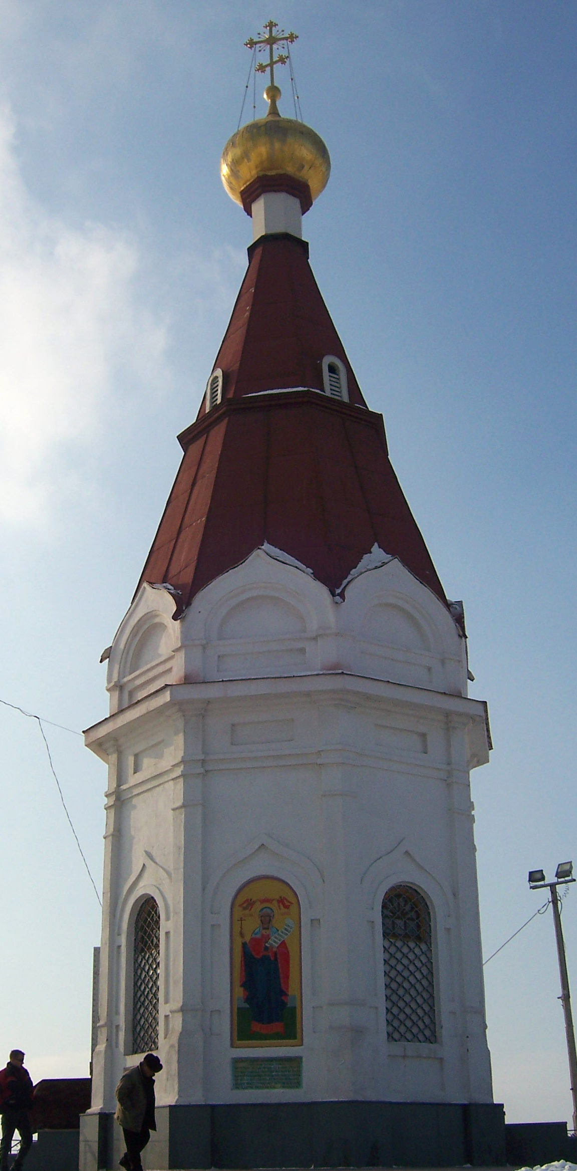 Chapel_Paraskewa-Pjatniza in Krasnojarsk